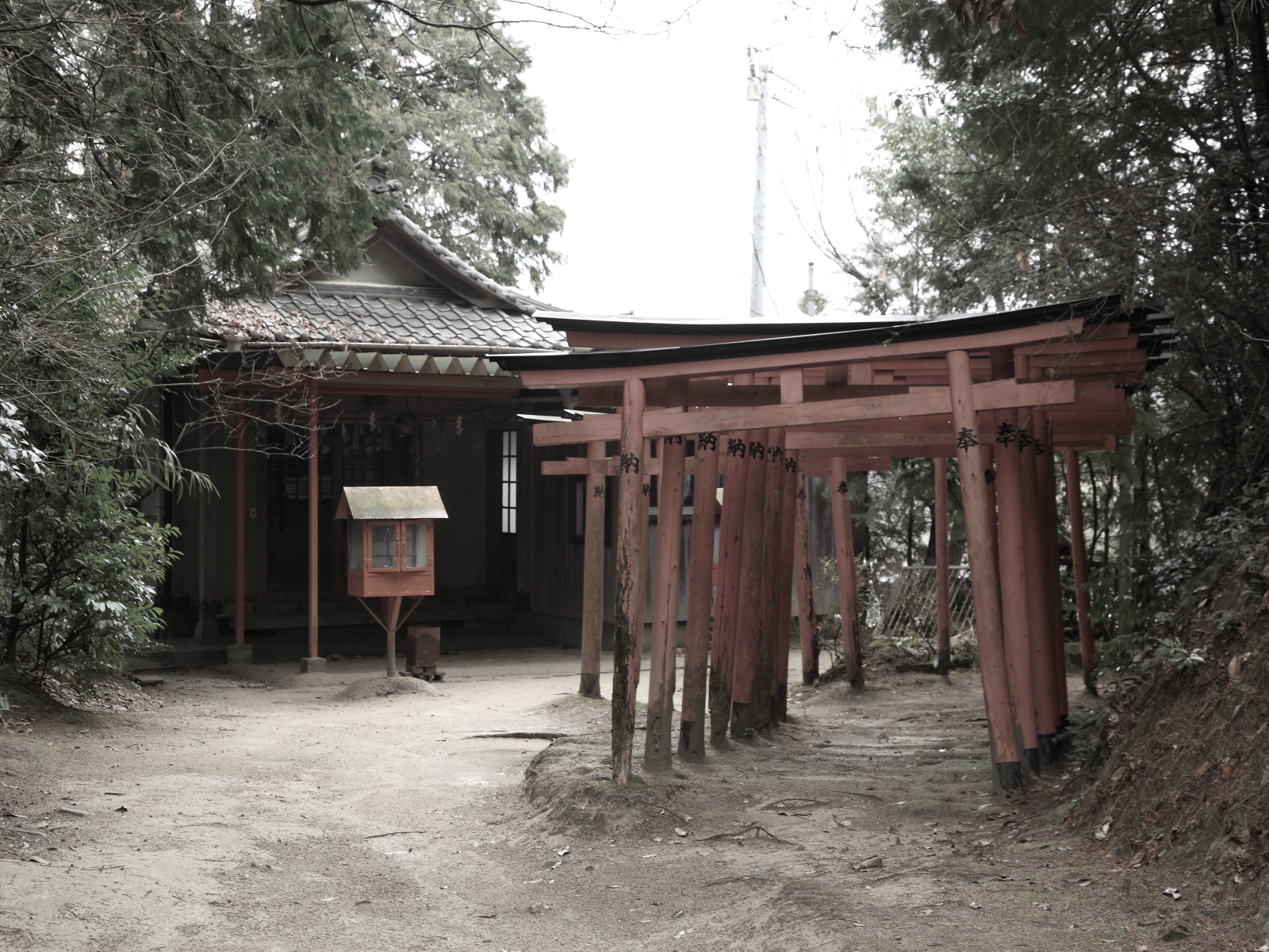 稲荷大神（豊田市松平町、2012年）